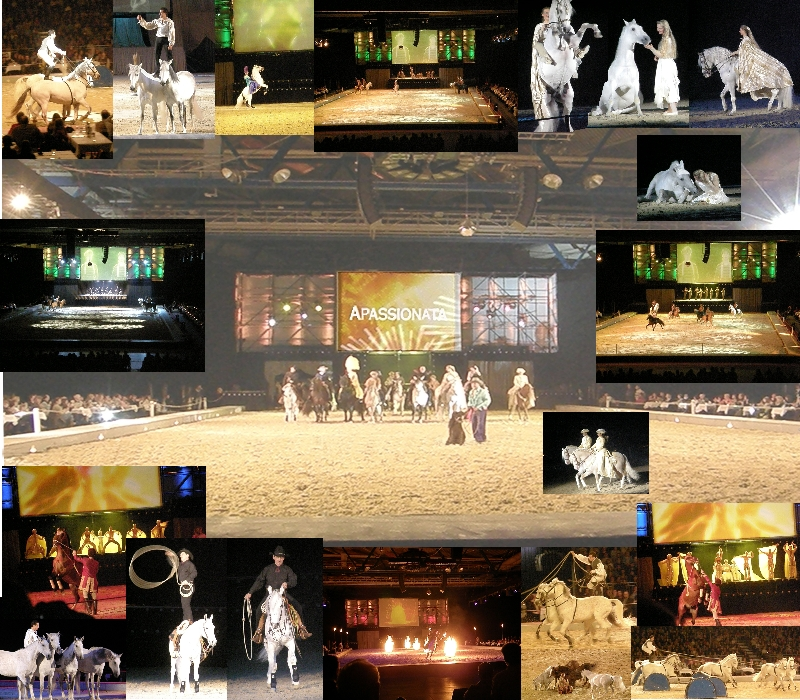 Zusammenstellung der Veranstaltung Apassionata in Stuttgart 2008